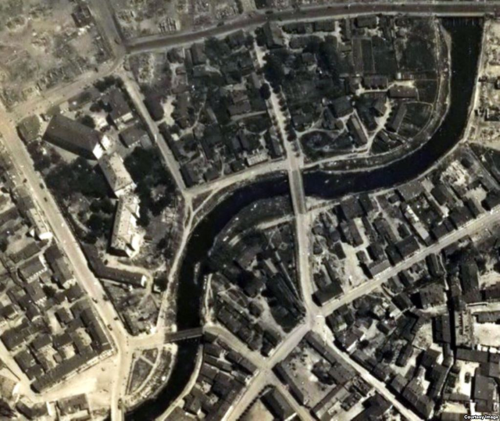 Беларуская (тарашкевіца): Менск (Miensk), Лавы (Łavy). Аэрафотаздымак